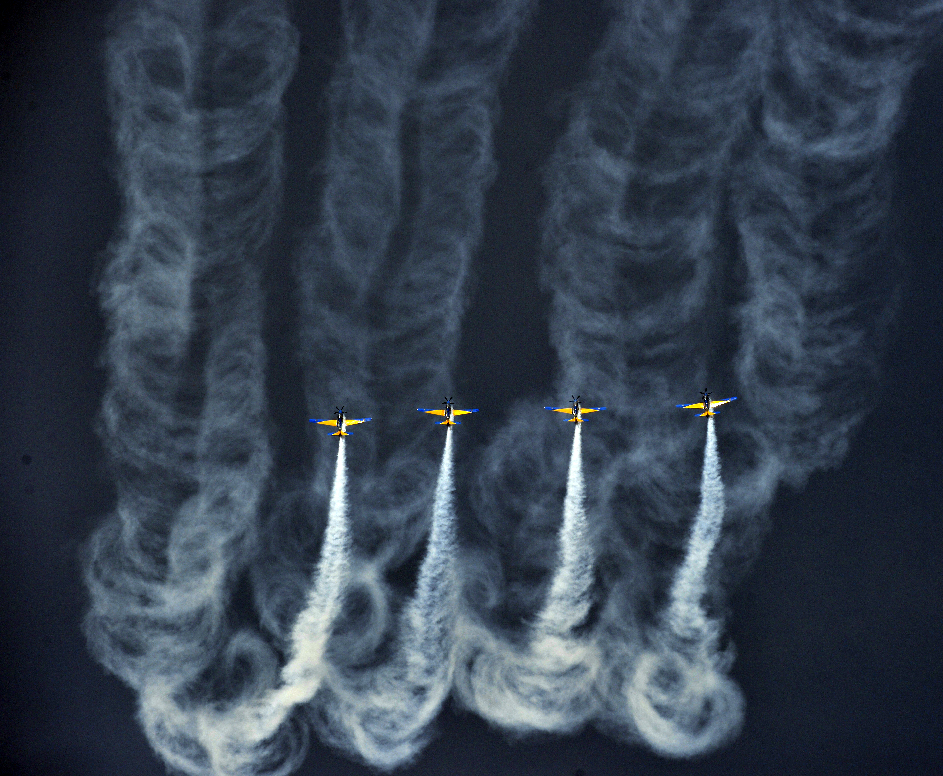 07/09/2015, Brasília - DF Fotos: Gilberto Alves